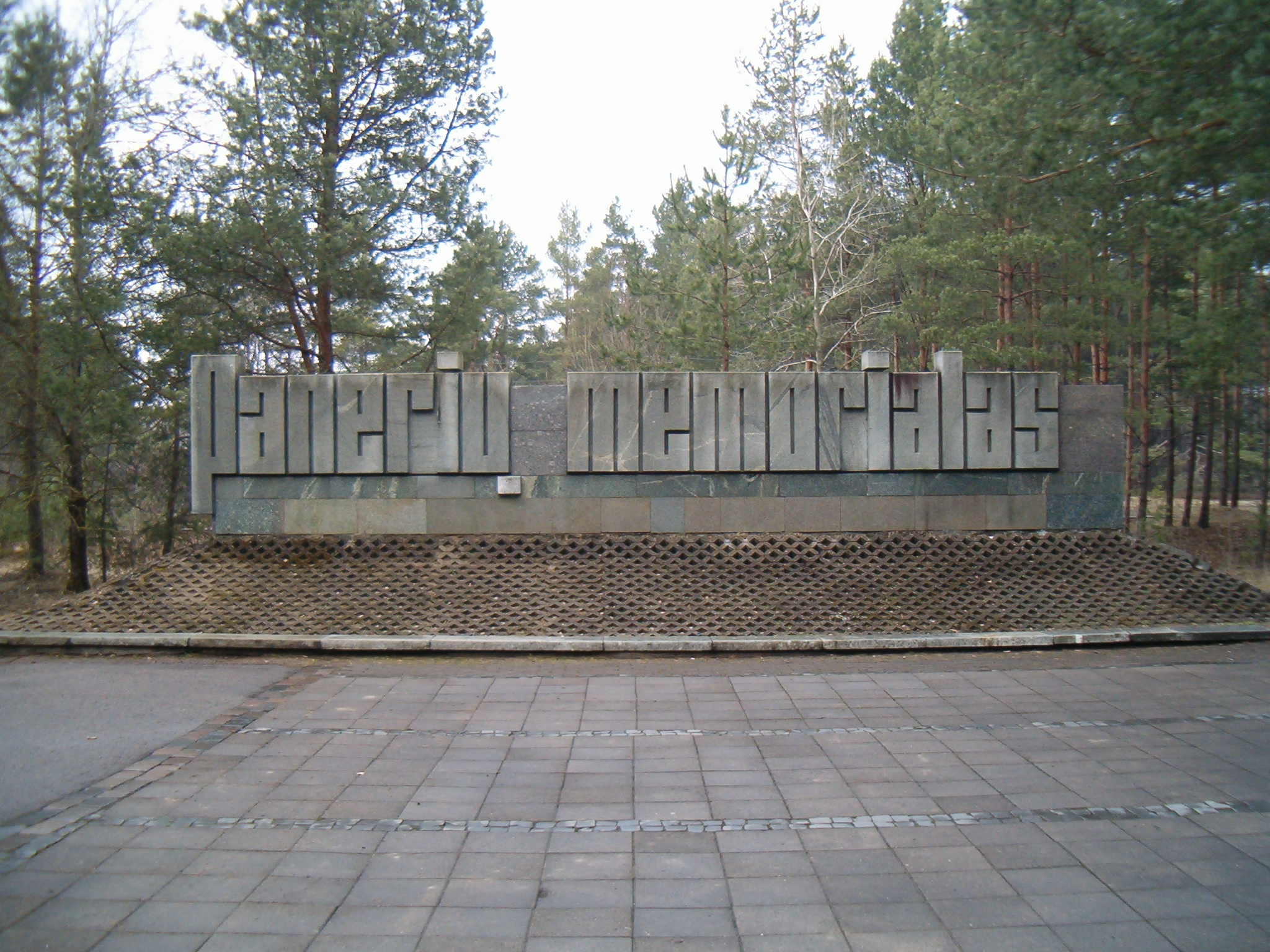 Paneriai, Vilnius, Lithuania